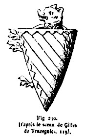 Gilles II de Trazegnies